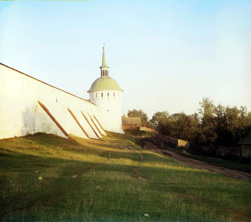 Стенная башня Александровского кремля